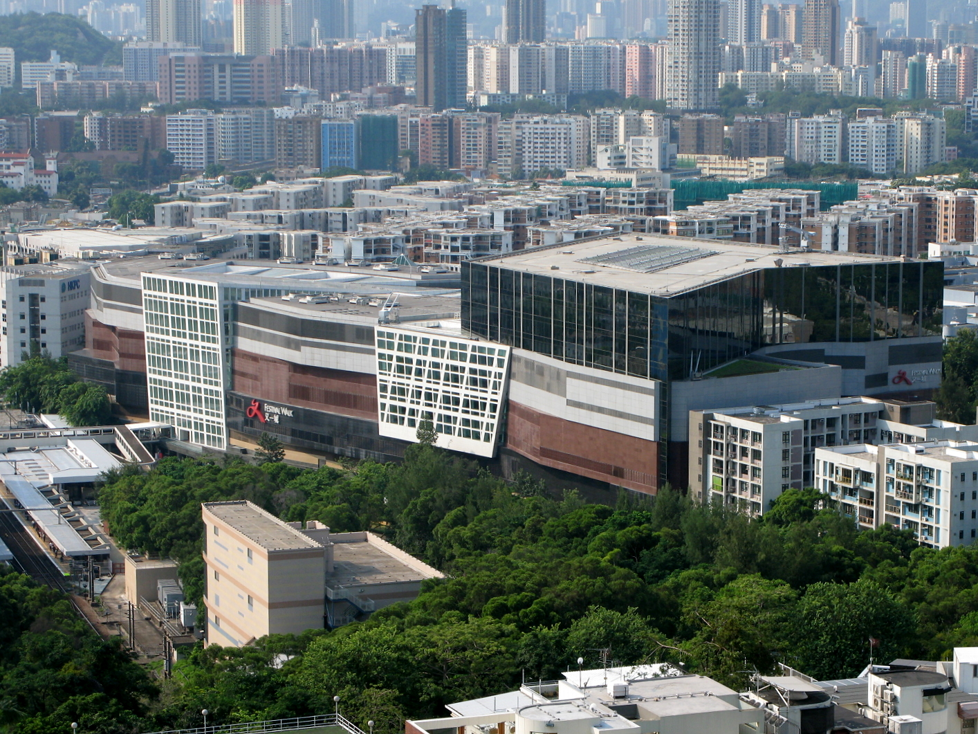 HK Festival Walk 又一城